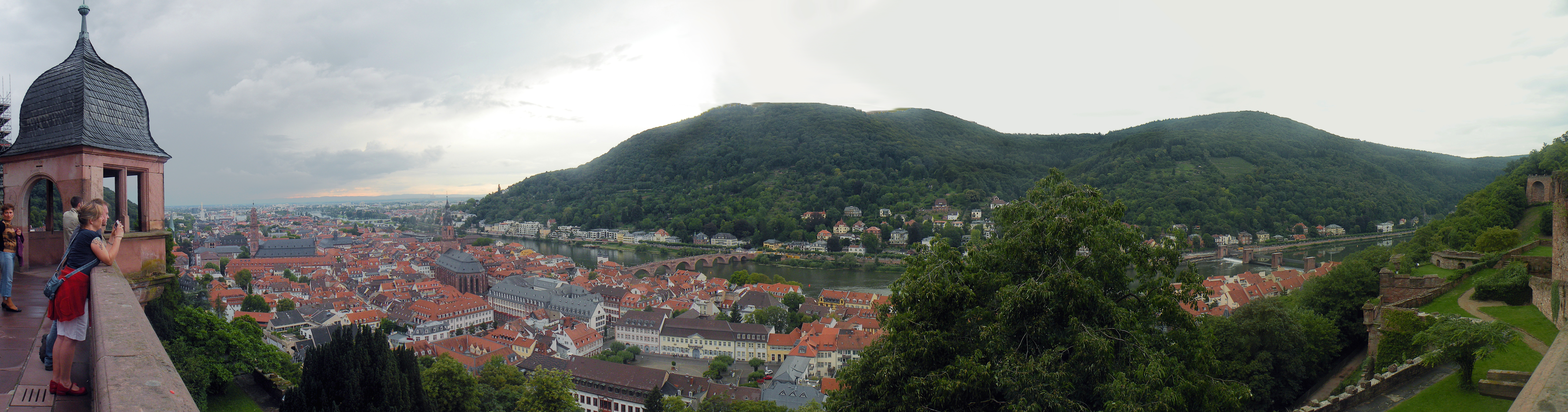 Neckar in Heidelberg